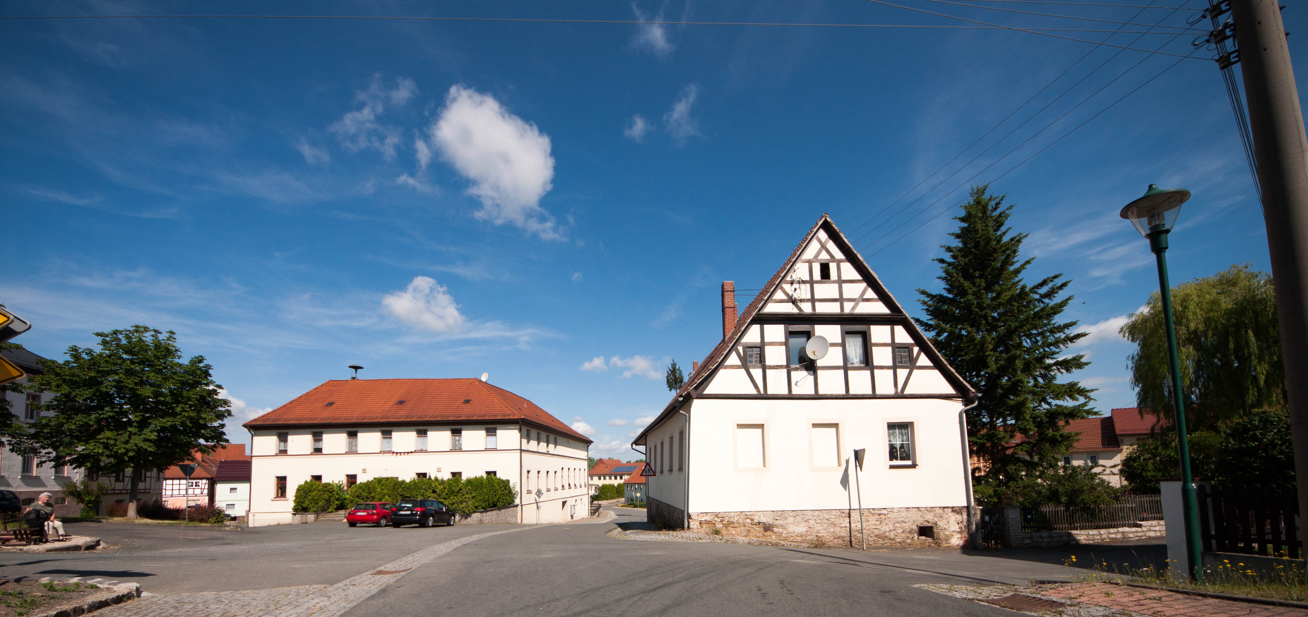 Dorfplatz von Weira mit Gaststätte 'Zur Fürstenfichte' und früherem Pfarrgebäude